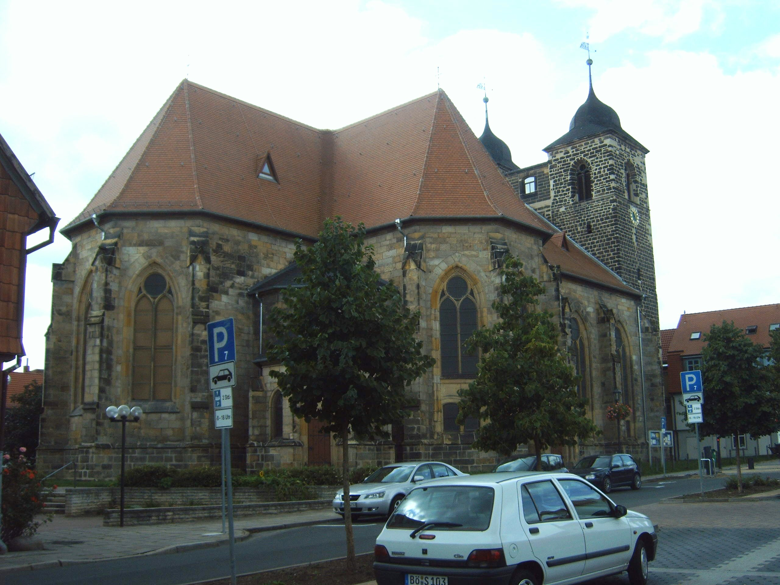 Sankt-Nikolai-Kirche Oschersleben, Nordseite, Sachsen-Anhalt, Deutschland